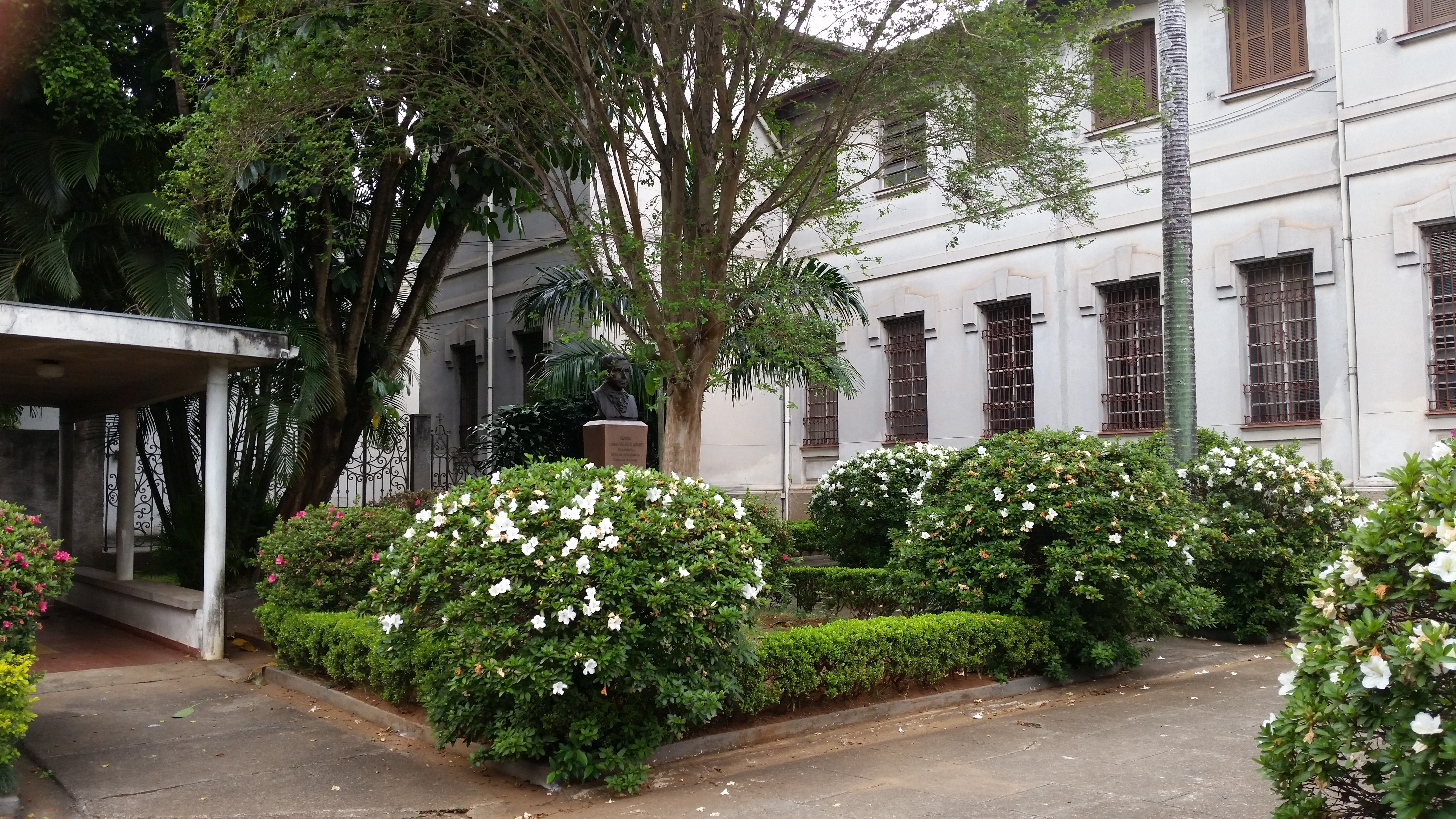 O jardim fica entre o portão de ferro de entrada e a fachada principal do Internato Nossa Senhor Auxiliadora. O jardim é composto por um caminho de arbustos com flores.